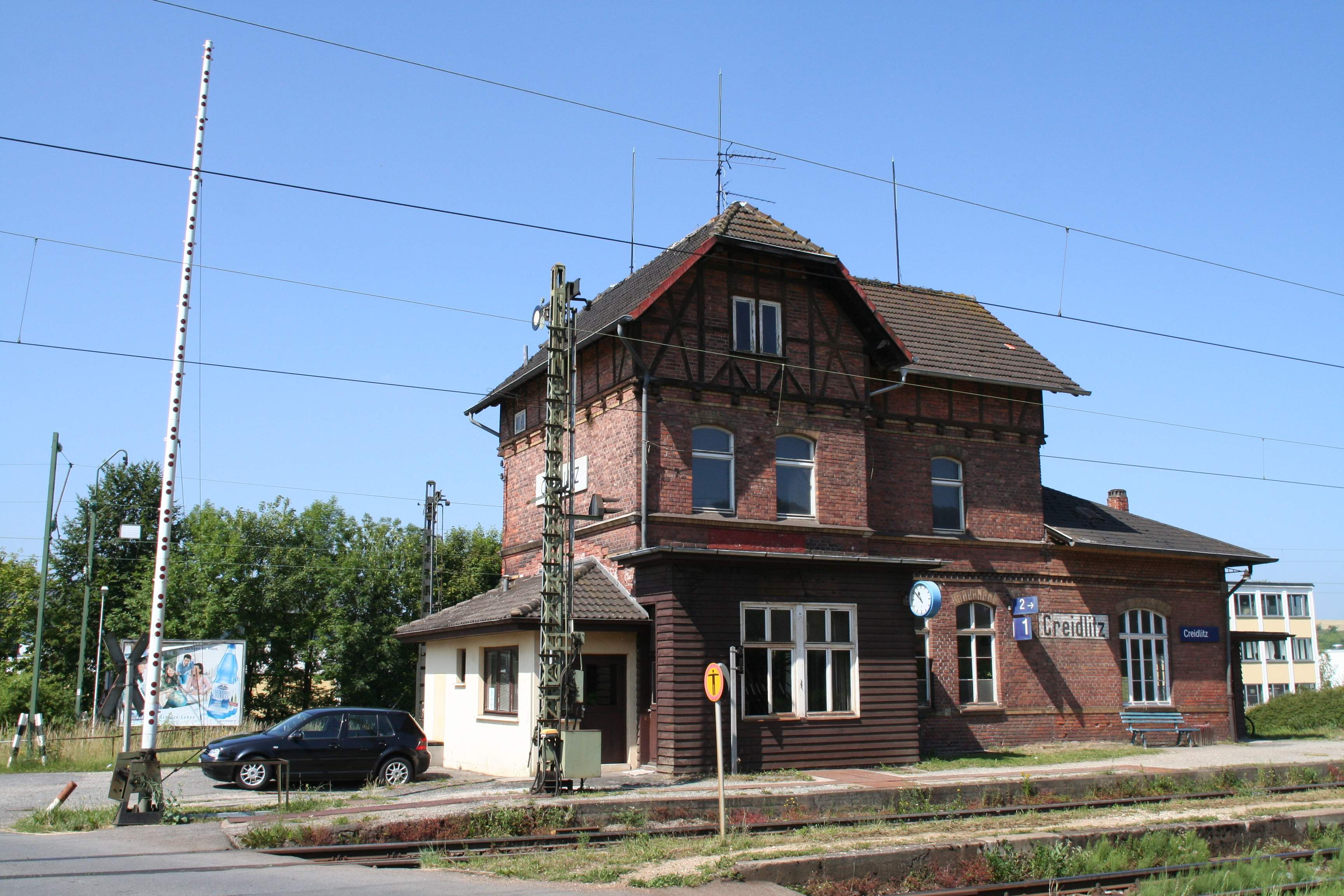 Bahnhof Coburg-CreidlitzOstfassade